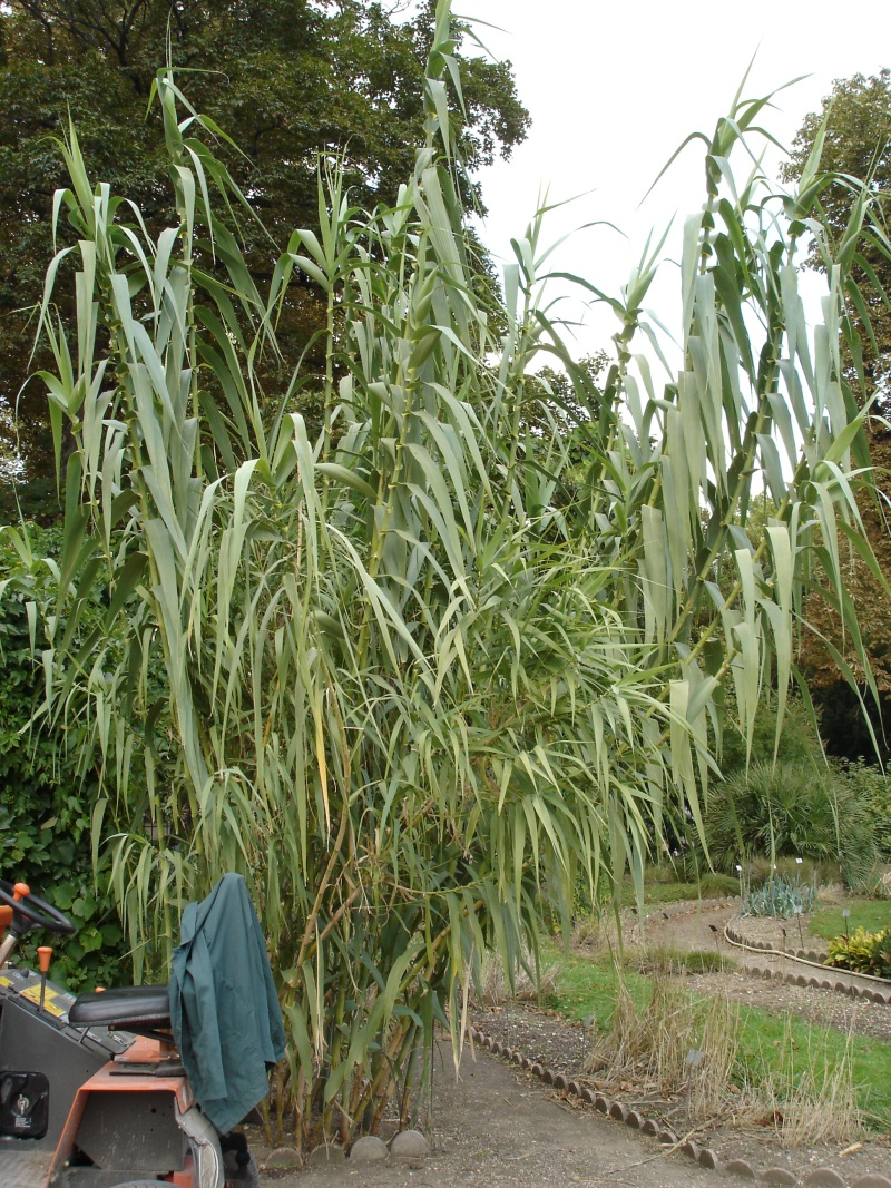 Arundo donax au Jardin des Plantes de Paris.